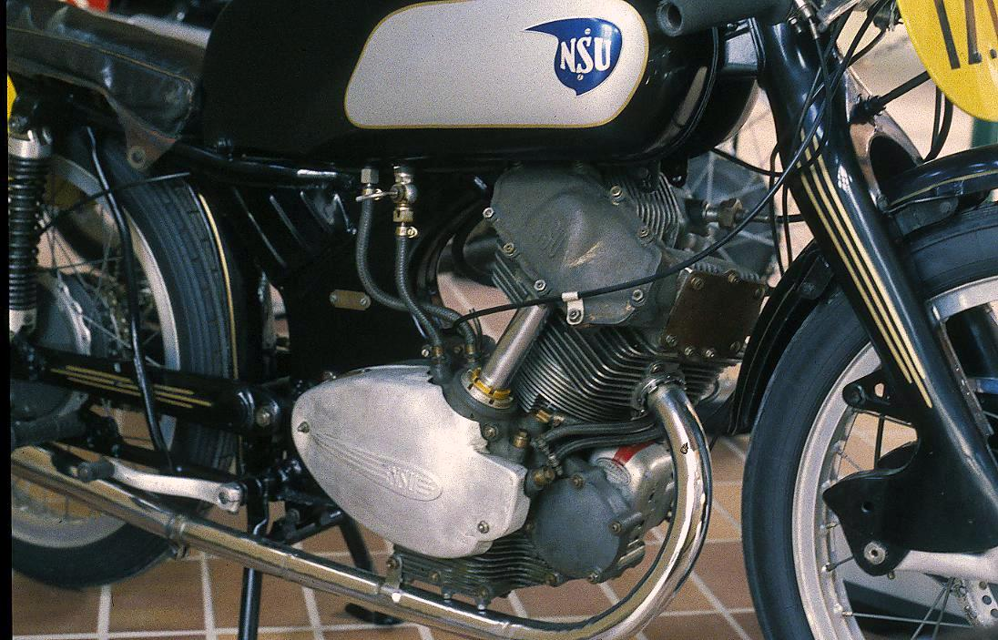 NSU Rennfox, Baujahr 1952, im Rennsportmuseum am Nürburgring